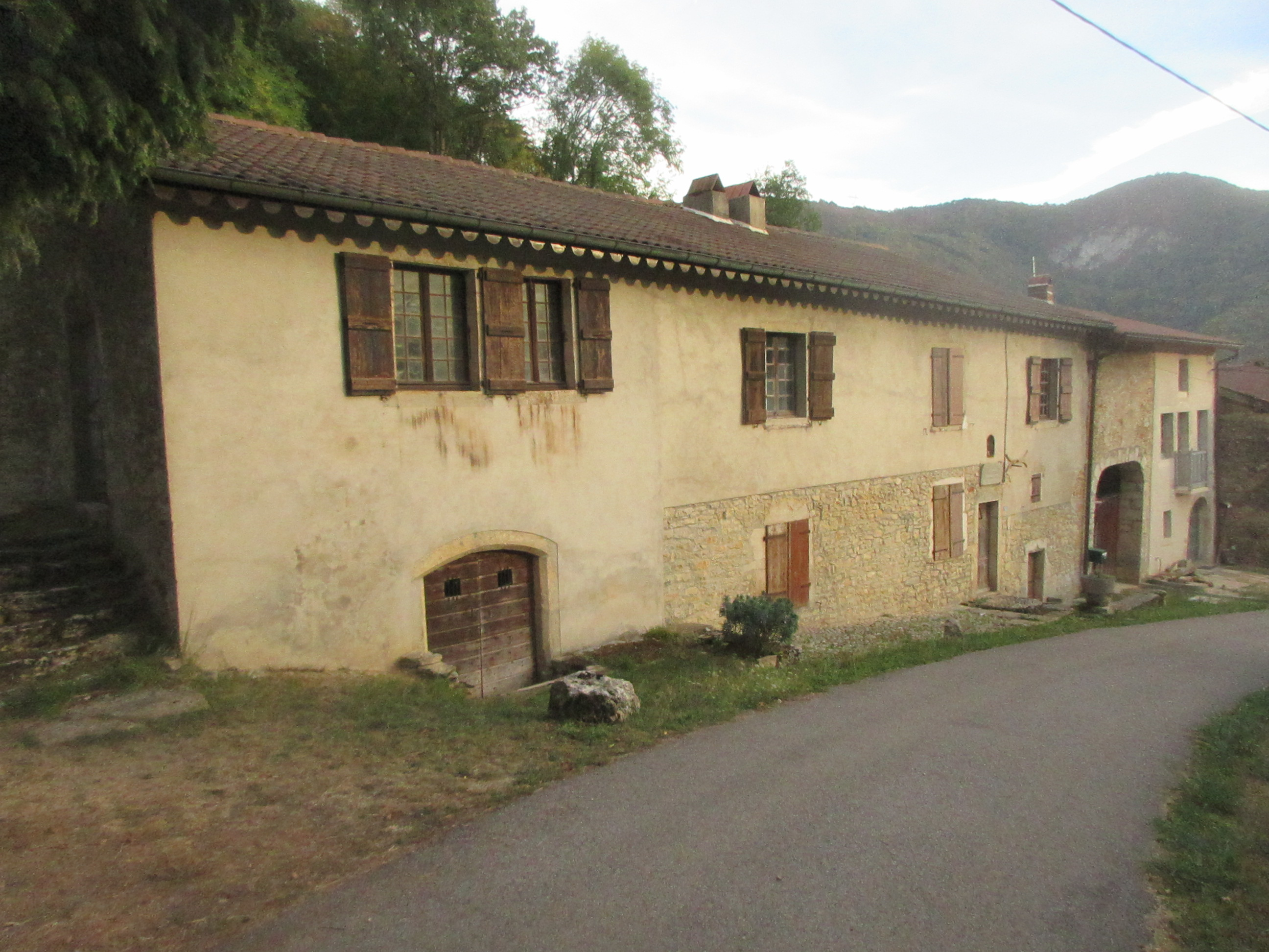 Maison natale de Xavier Bichat, Thoirette-Coisia.